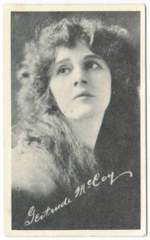 Gertrude McCoy